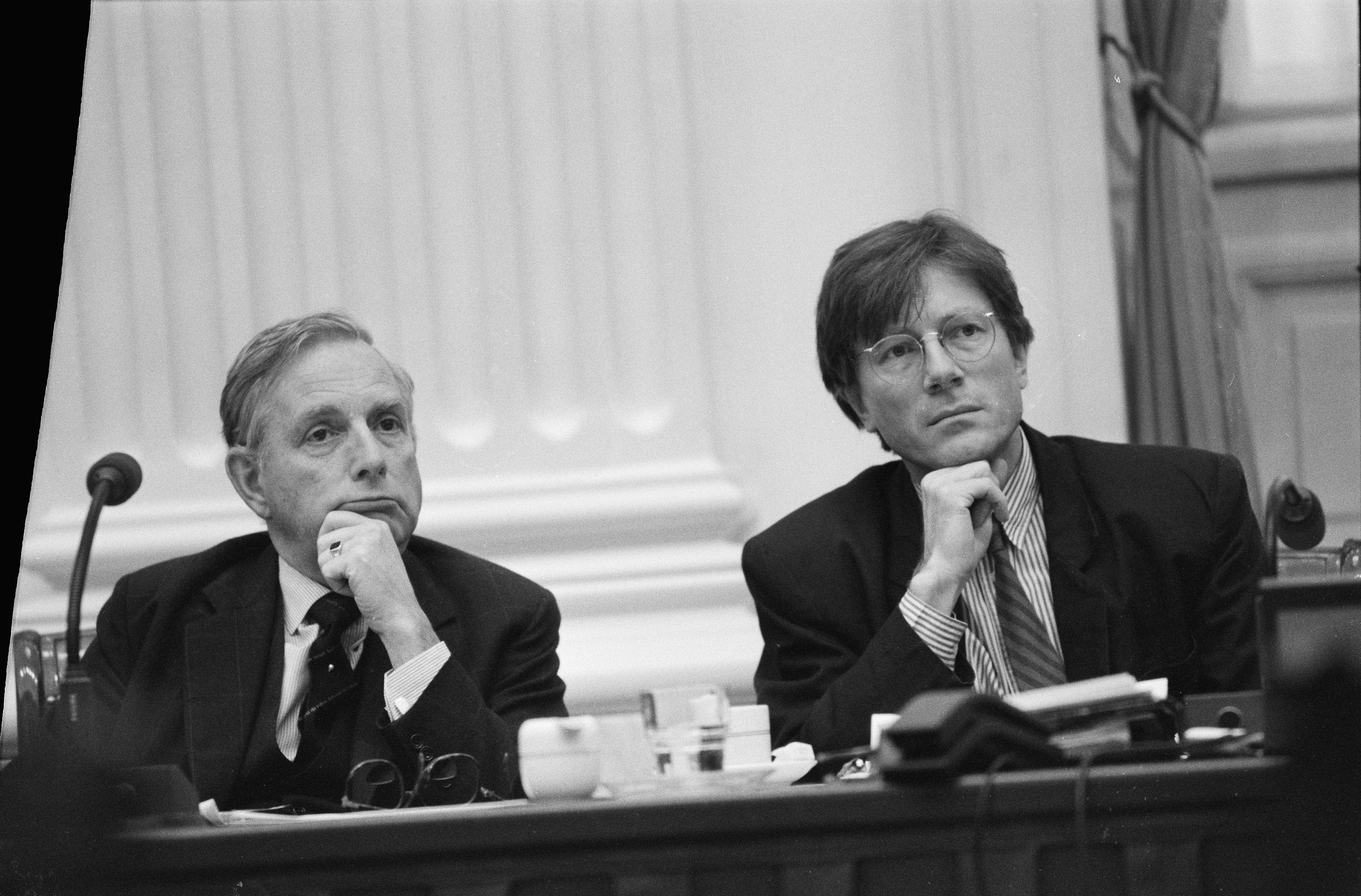 Collectie / Archief : Fotocollectie Anefo Reportage / Serie : [ onbekend ] Beschrijving : Behandeling in de Tweede Kamer van wetsvoorstellen inzake euthanasie, minister Korthals Altes (l) en D66-kamerlid Kohnstamm Datum : 27 april 1989 Locatie : Den Haag, Zuid-Holland Trefwoorden : ministers, parlementariërs, politiek, wetsvoorstellen Persoonsnaam : Kohnstam, J., Korthals Altes, Frits Fotograaf : Bogaerts, Rob / Anefo Auteursrechthebbende : Nationaal Archief Materiaalsoort : Negatief (zwart/wit) Nummer archiefinventaris : bekijk toegang 2.24.01.05 Bestanddeelnummer : 934-4454